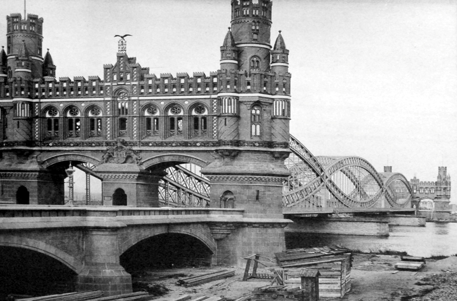 _Portal der alten Elbbrücken 1887